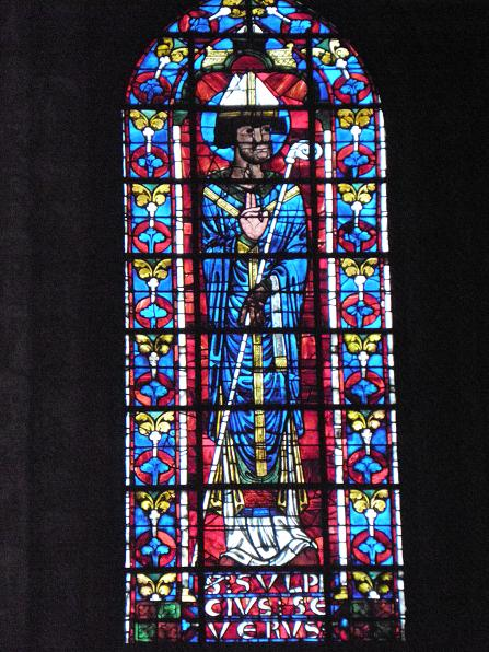 Vitrail de Sulpice Sévère (Cathédrale de Bourges (18))